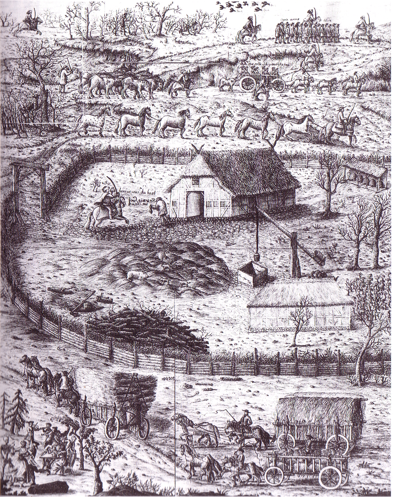 Berittene berauben und rekrutieren Bauern. Federzeichnung auf Papier mit volkstümlicher Schilderung der Zustände , Mitte 18.Jh. Bildbeschreibung: Die Ausplünderungen der ländllichen Bevölkerung durch preußische Truppen im Siebenjährigen Krieg werden drastisch gezeigt. Das Bild gliedert sich in mehrere Ebenen. oben links - Husar galoppiert auf Waldstück zu; er erscheint weiter rechts mehrfach als Antreiber einer Bauerngruppe, die klagt "o wir arme Lüd"; der Krähenschwarm ruft "Rach, Rach, Rach"; die auf einem Leiterwagen zusammengetriebenen Rekruten seufzen "Owe das solte ich gewust haben"; am Haus wird der Bauer vom Husaren angetrieben "Gib heraus was du hast"; der Bauer hält einen leeren Geldsack hin und spricht "Hier is mine Sweet und Blaut";eine Bauersfrau schreit "Hew yi den Man weg sau naimbt de Kiener ook mit"; hinter der Klapptür sind erpresste Nahrungsmittel erkennbar;auch Wunschdenken zeigt sich anhand des Soldaten im Sarg und dem Füllhorn, welches über dem Bauern ausgeschüttet wird.